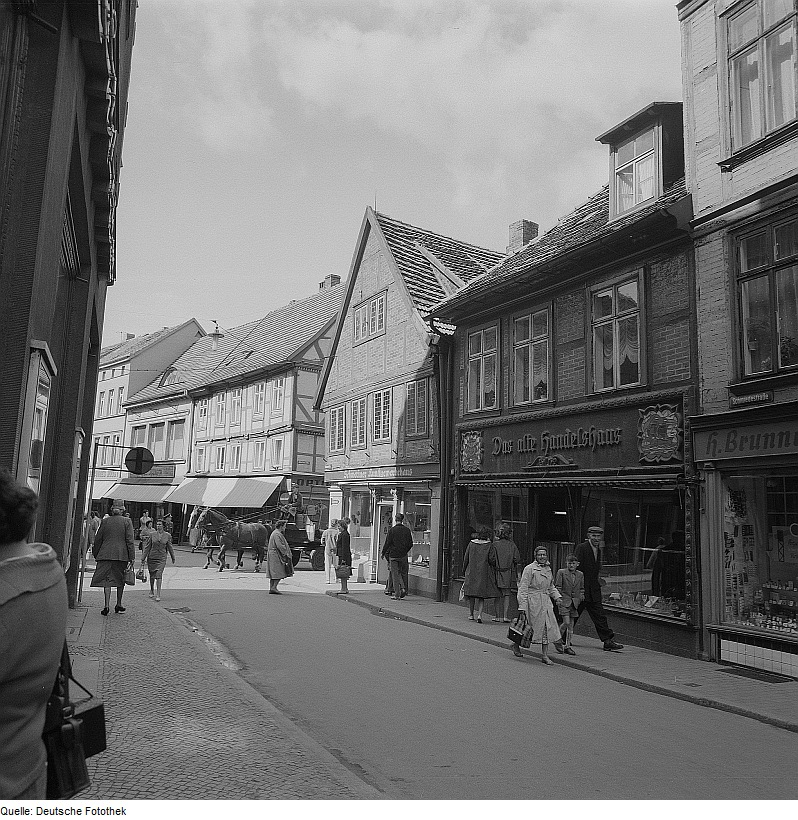 Original image description from the Deutsche Fotothek Schwerin. Blick entlang der Schmiedestraße